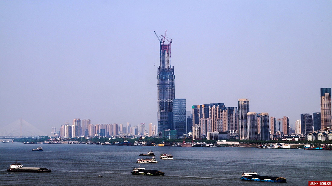 27 апреля 2017 г.